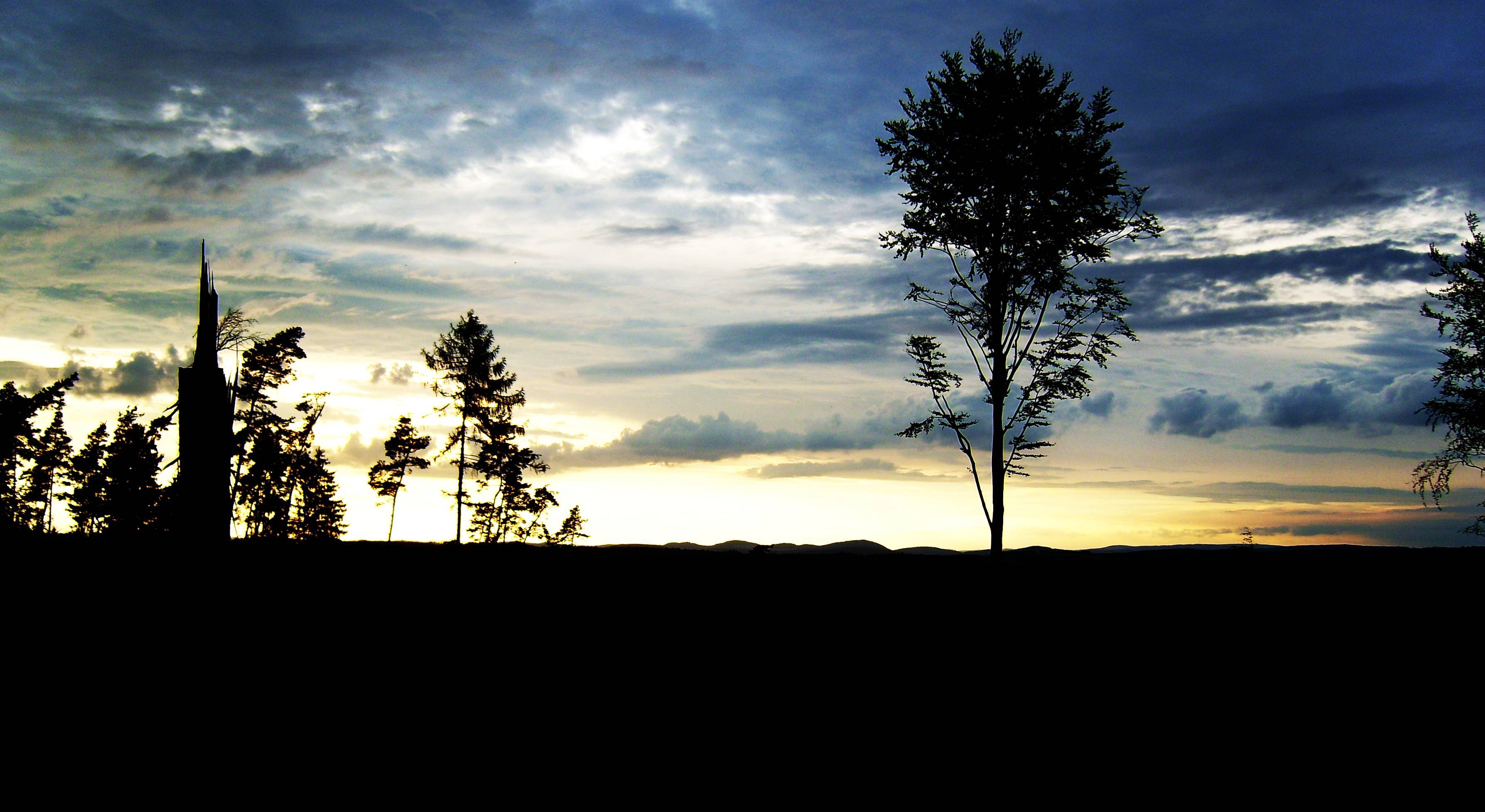 Der 322m hohe Wittstrauch ist der nördliche Nebengipfel des Frauenberges. Durch Kyrill ist die Bewaldung hier Ende 2006 erkennbar verwüstet worden. Der zweite Gipfel links der zentralen Buche ist der Rimberg